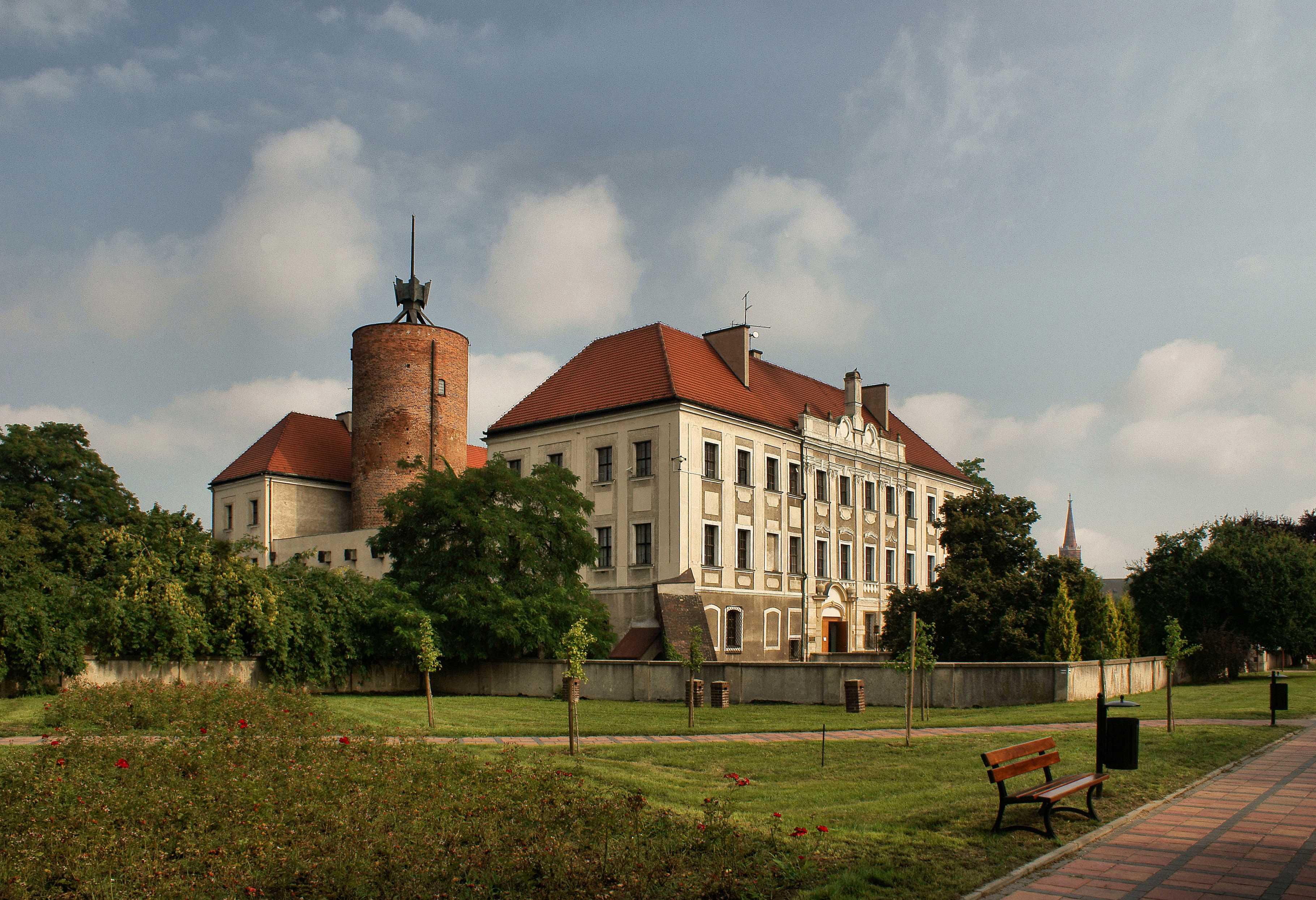 Głogów, ul. Brama Brzostowska - zamek książęcy (zabytek nr A/2885/80/300/L)